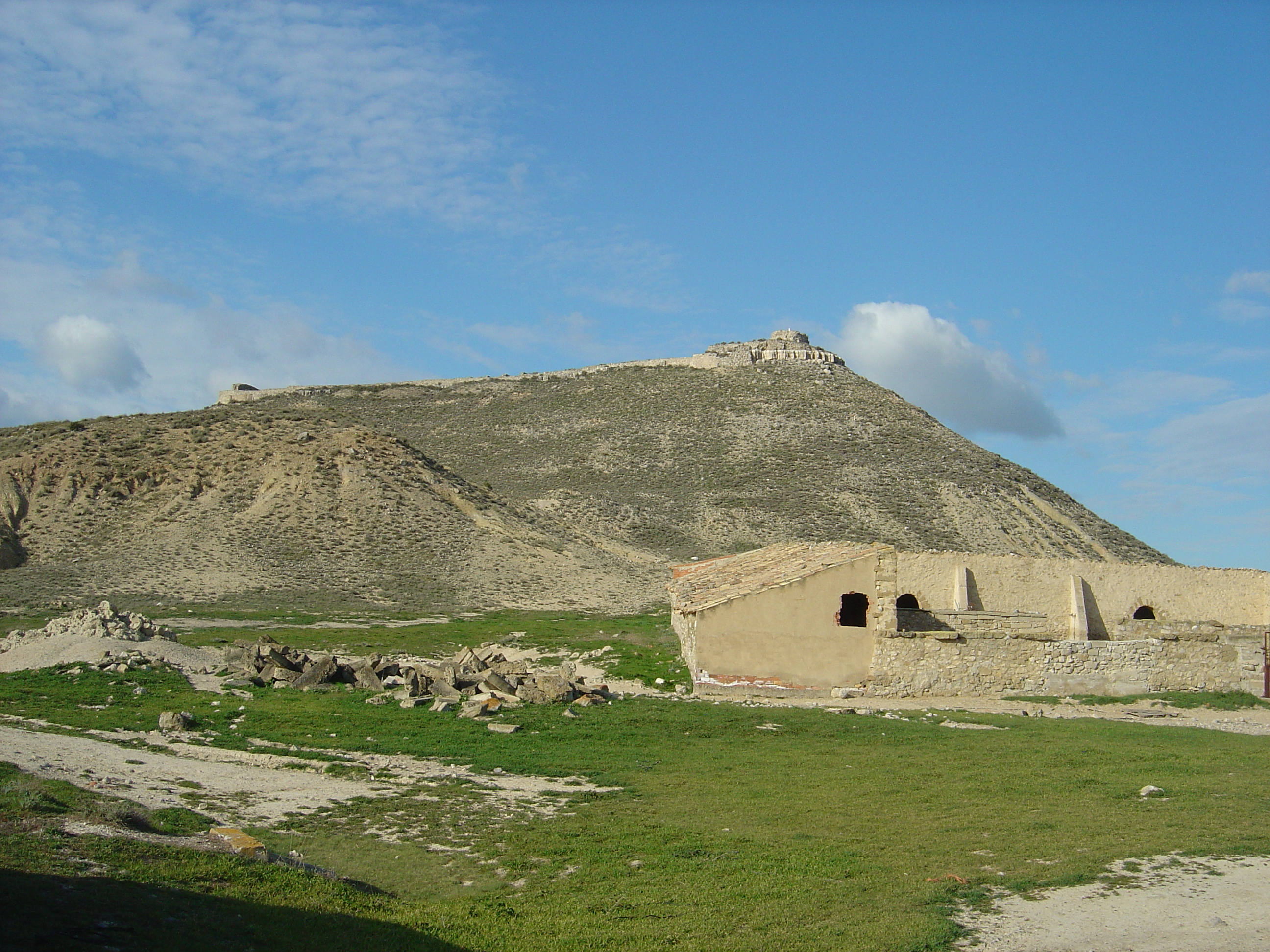 Rada. Navarra. Spanien. Fortaleza